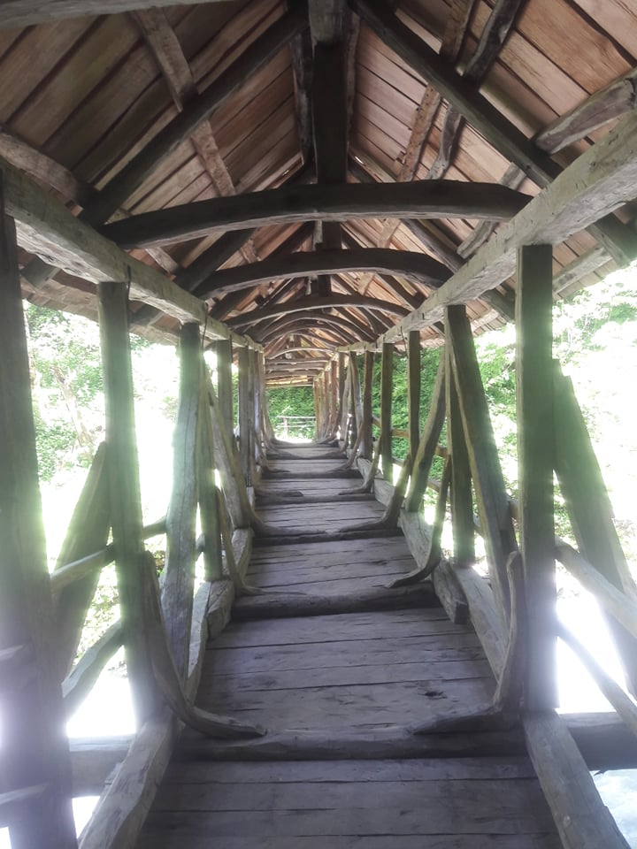 ხაბელაშვილების ხიდი 300 წლისაა